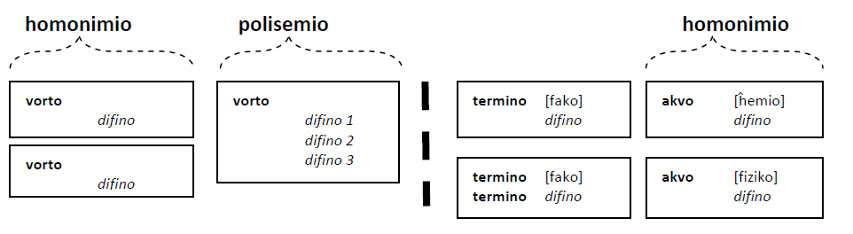 Maldekstre, homonimio kaj polisemio en vortaraj registraĵoj; dekstre, homonimio en terminaraj registraĵoj.